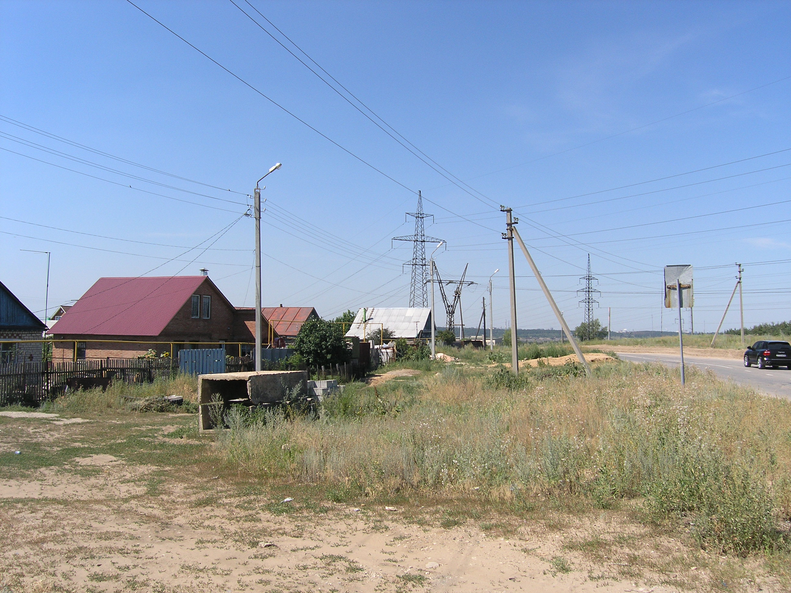 Улица Бориса Коваленко. Тольятти. Россия